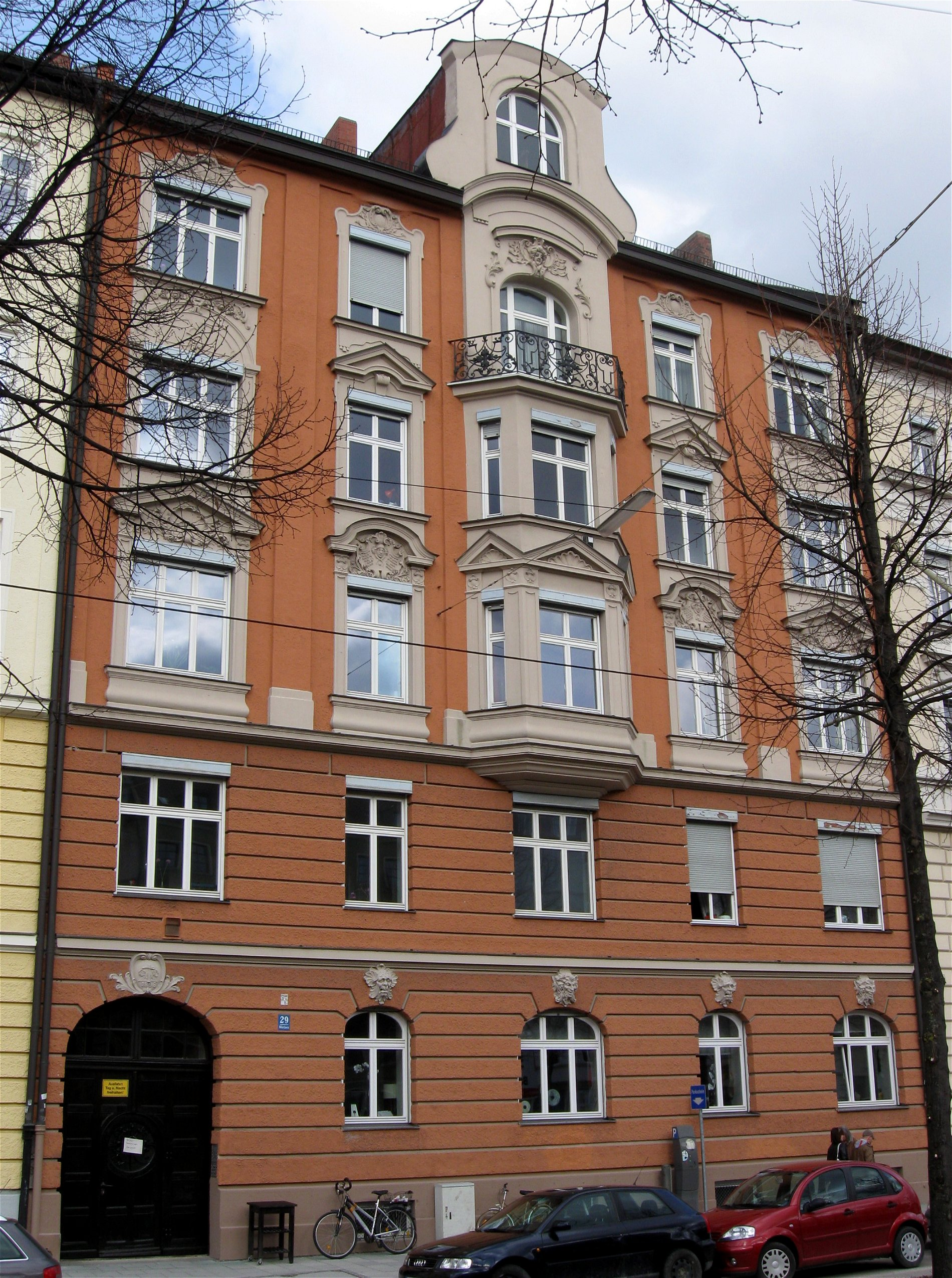 Wörthstraße 29; Mietshaus, neubarock, mit Erker, Masken und Giebel, bez. 1896, von Ernst Schnetzler; Gruppe mit Nr. 27.